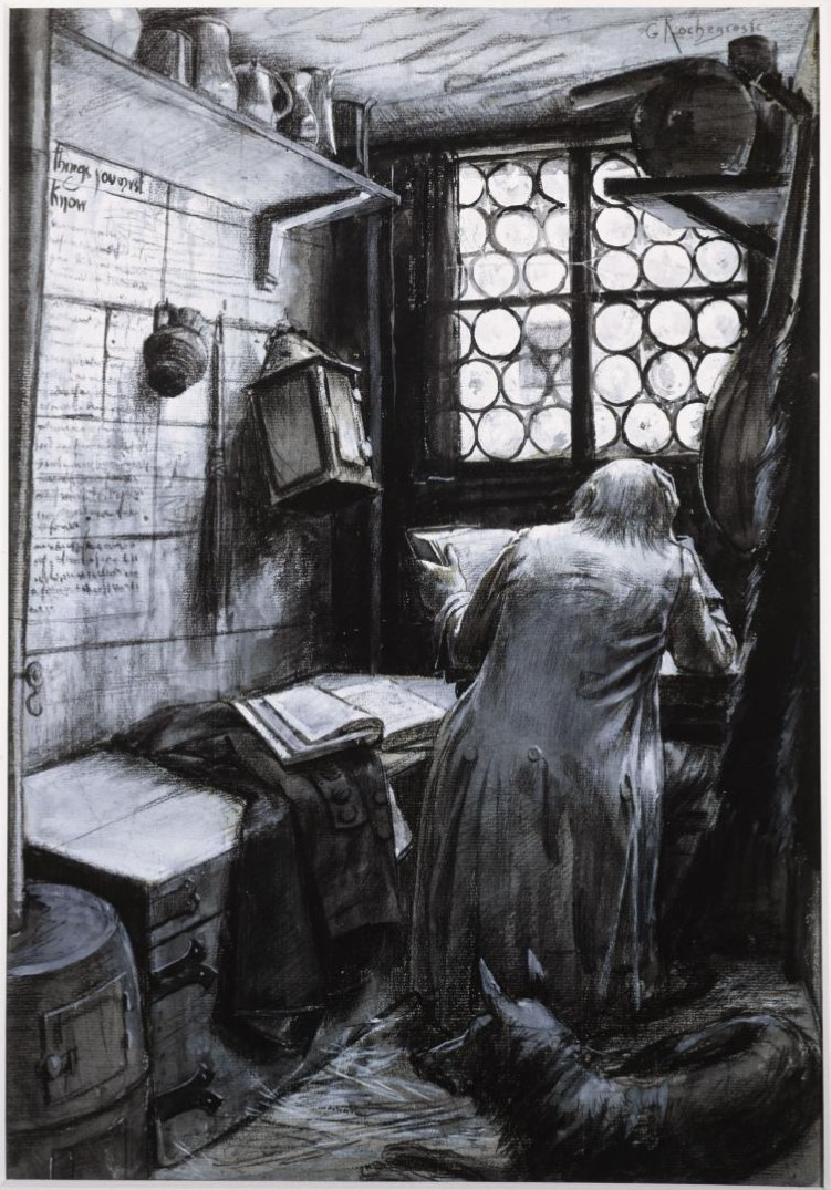 Ursus dans sa cahute. Ce dessin de Georges-Antoine Rochegrosse a servi de modèle à la gravure de Fortuné Méaulle reproduite en page 13 du roman de Victor Hugo, L'Homme qui rit, dans l'Édition Hugues (1886). L'illustration correspond au texte de la première partie « La mer et la nuit », livre I « Deux chapitres préliminaires », chapitre I « Ursus ».